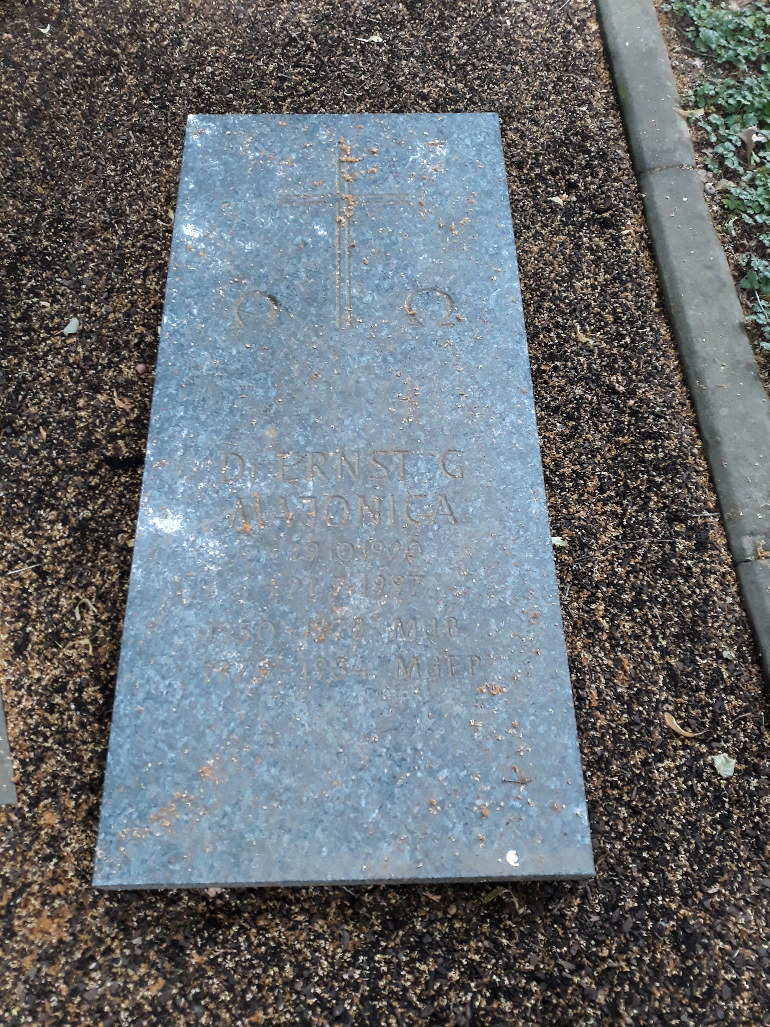 Das Grab des deutschen Politikers Ernst Majonica (CDU) im Familiengrab auf dem Osthofenfriedhof Soest.